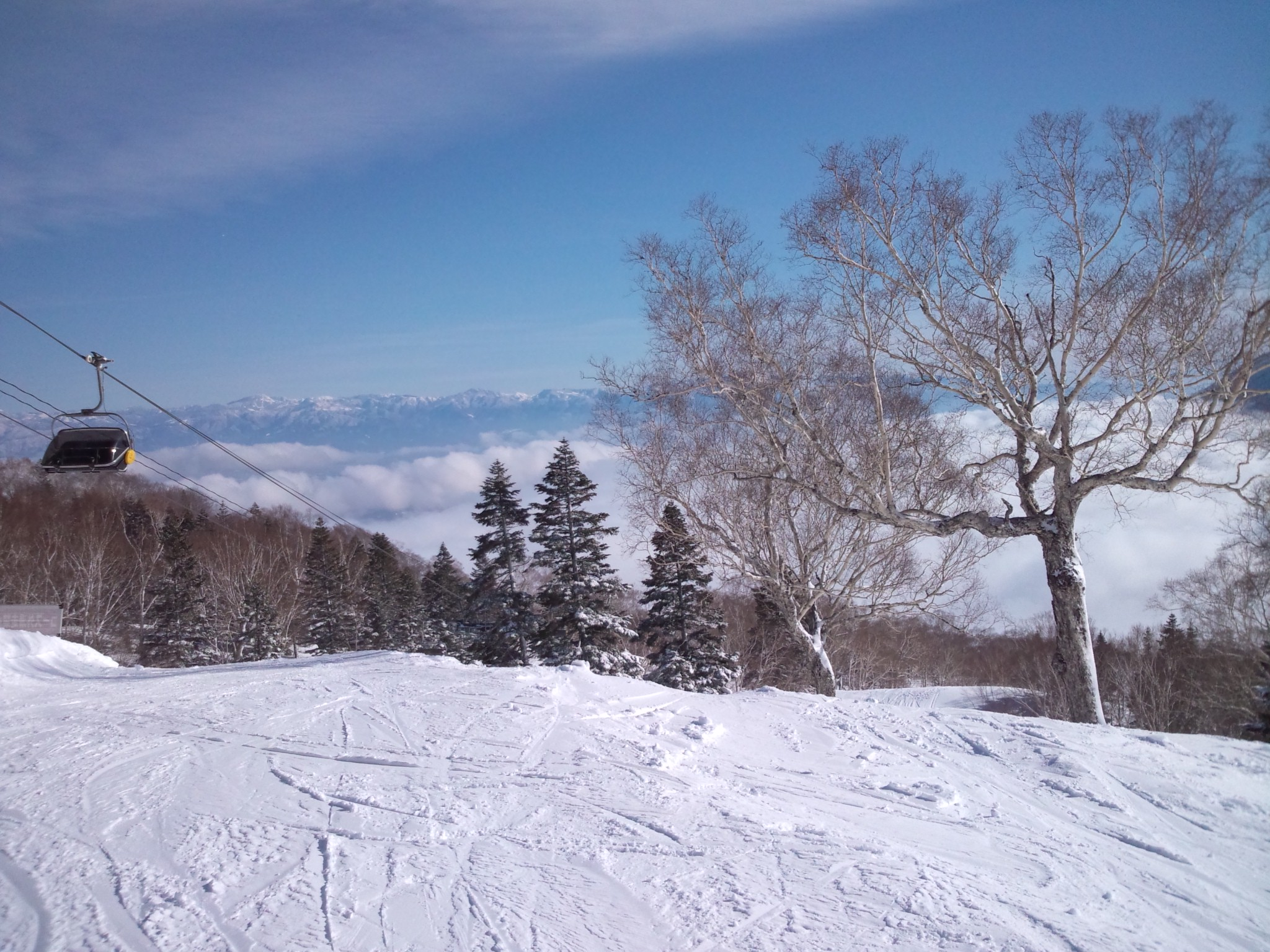 妙高杉ノ原スキー場の山頂